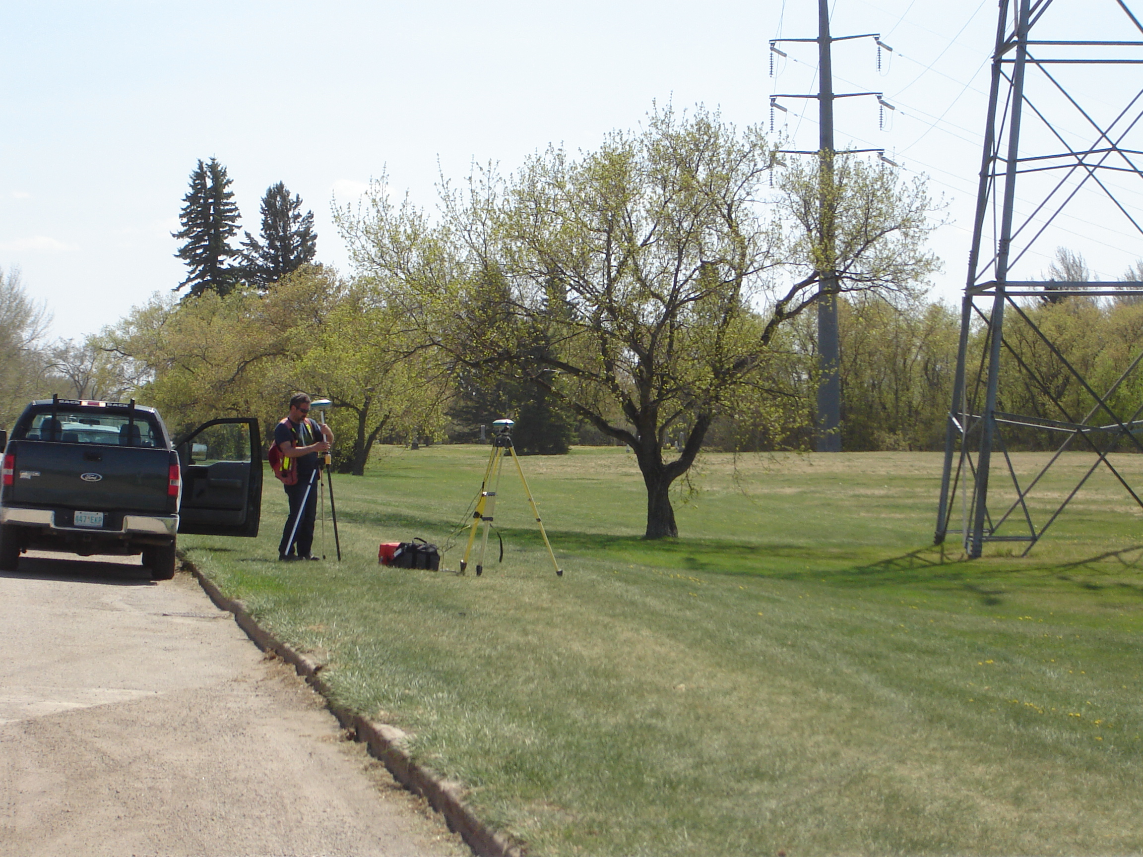 Surveyor Diefenbaker Management Area Exhibition, Saskatoon Saskatoon, Saskatchewan, Canada